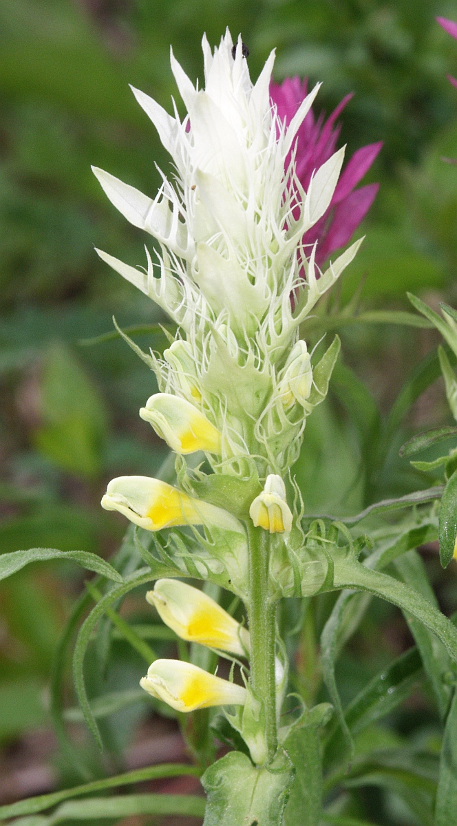 Melampyrum arvense "var. alba", Hohenlohe, Germany